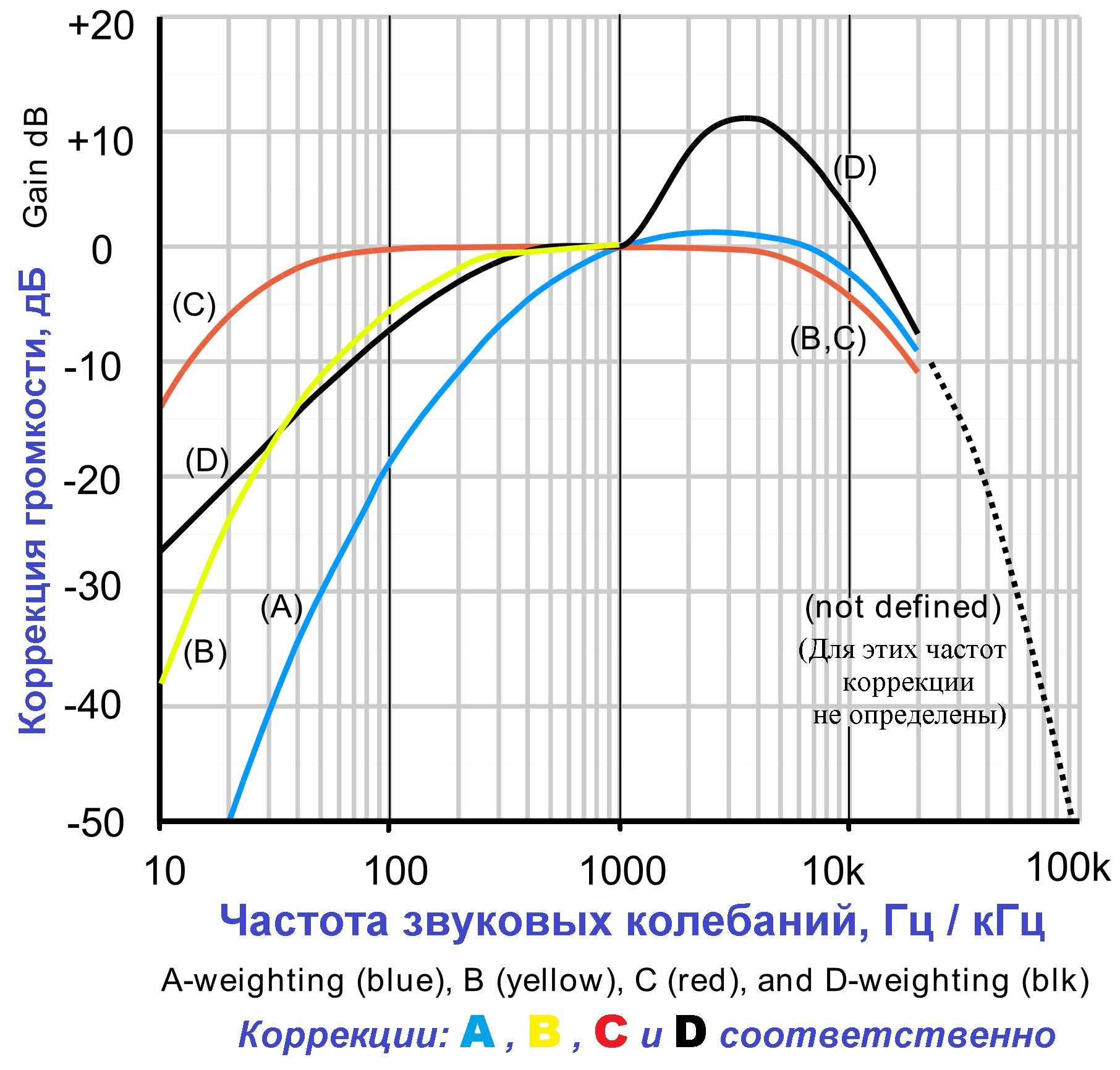 Звуки разной частоты при одинаковом физическом звуковом давлении воспринимаются ухом человека как звуки не одинаковой громкости. Для того, чтобы учесть отличие между фактическим уровнем звукового давления и его субъективным восприятием, разработаны корректирующие поправки. А - коррекция разработана для звуков сравнительно небольшой, "нормальной" громкости. При увеличении (физического) звукового давления, и при той же самой частоте, отличие между фактической и субъективной громкостью будет изменяться. Поэтому - для больших уровней громкости - были разработаны и другие виды коррекции (B, C и D), которые позволяют учитывать изменение корректирующих поправок.